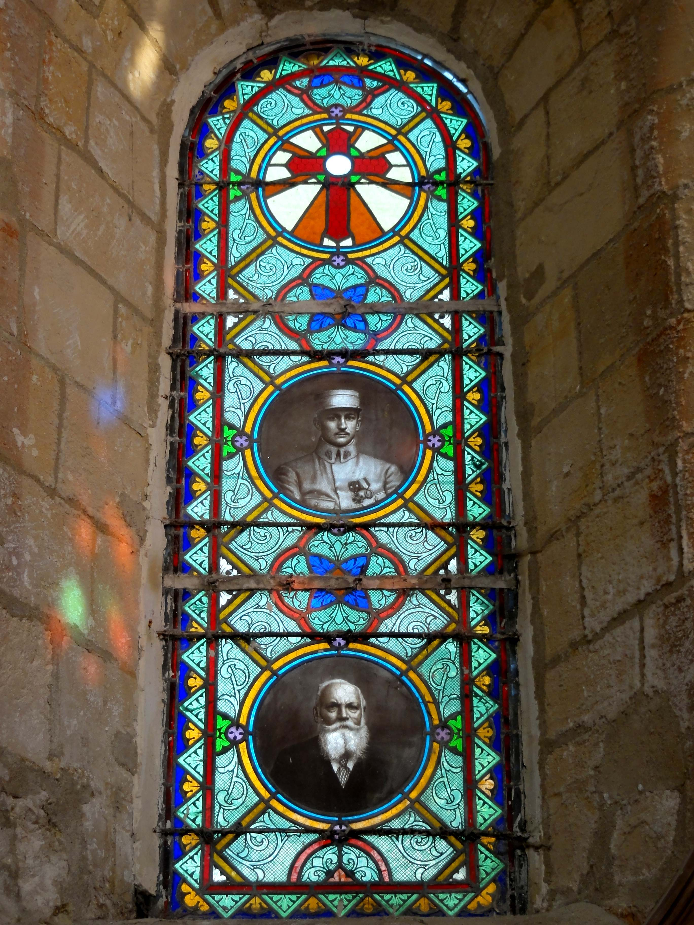 Mobilier de l'église - voir titre.